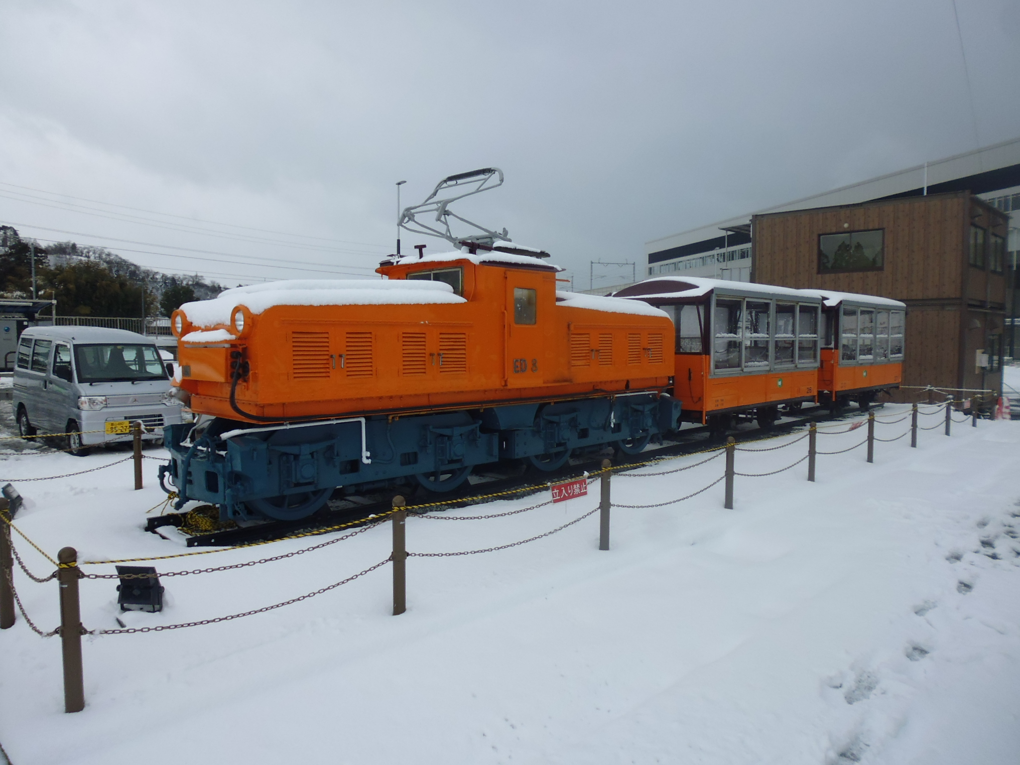 富山地方鉄道新黒部駅前に保存されている黒部峡谷鉄道ED8+ハフ26・27客車